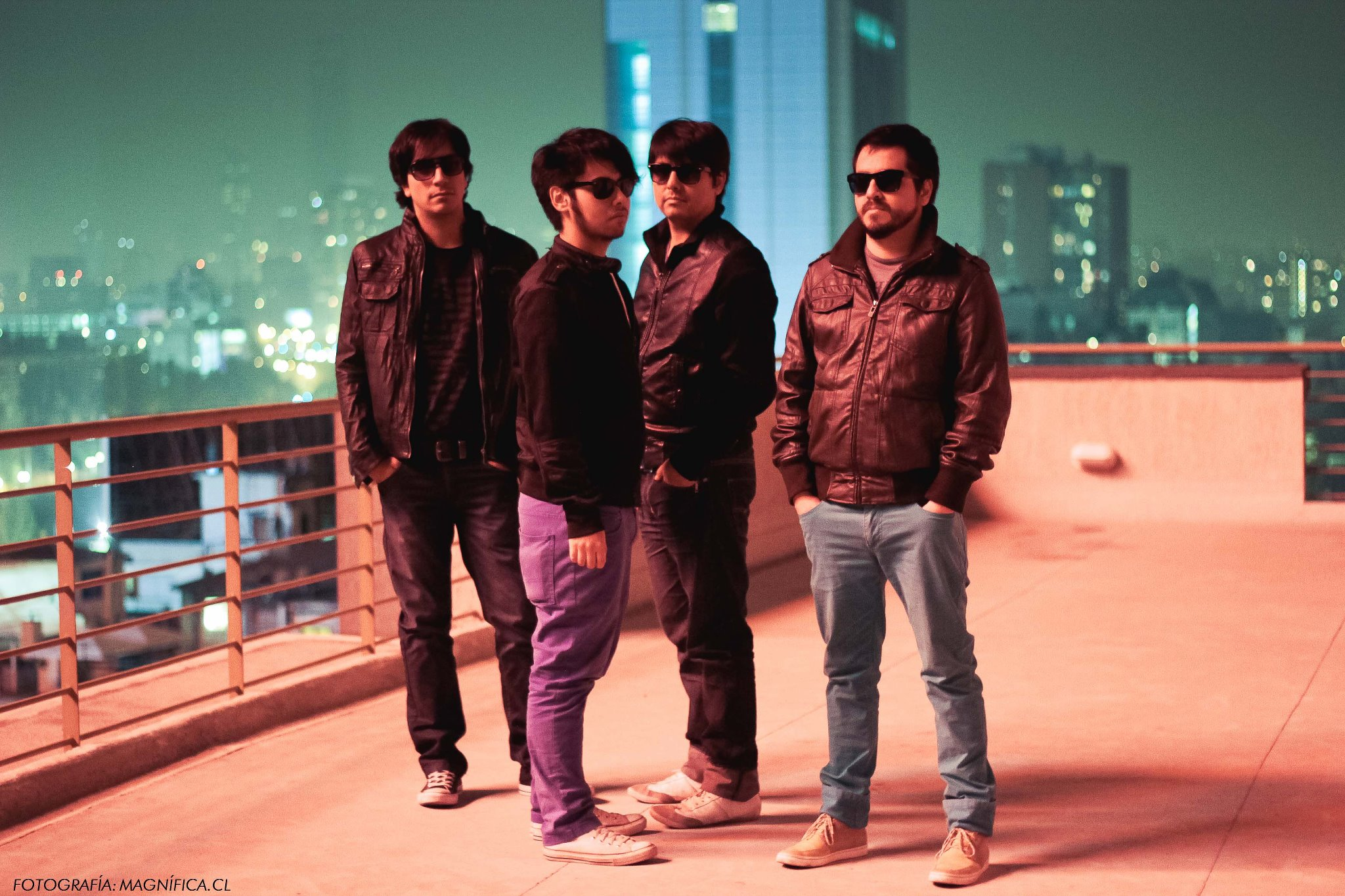 Banda de rock pop, con pinceladas de electrónicas indie. (Chile)